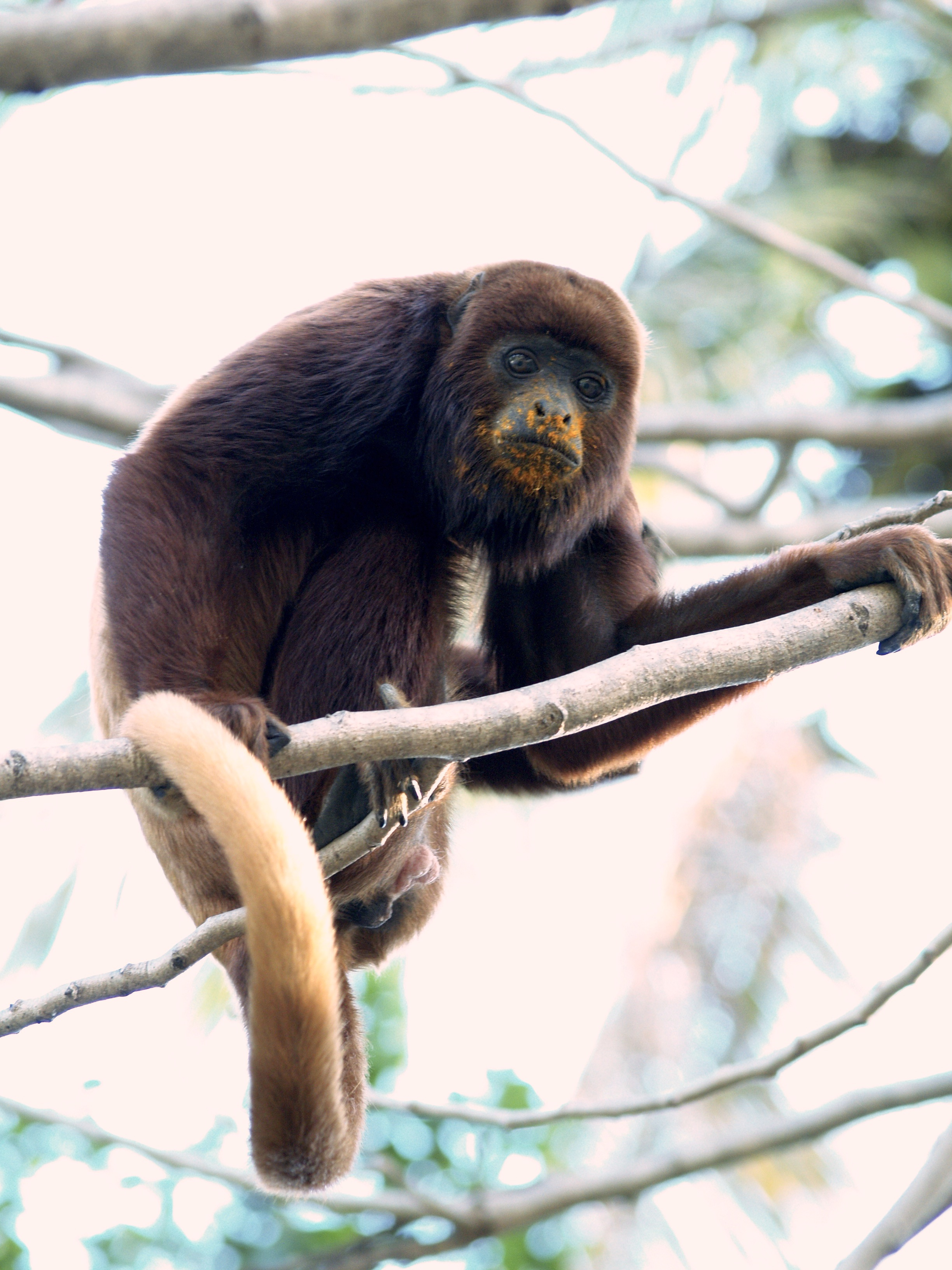 Es un mono hembra, araguato, se caracteriza por su pelaje rojizo y sus aullidos, tiene la boca manchada de amarillo porque estaba comiendo un mango. Hato El Cedral, Edo. Apure, en Venezuela